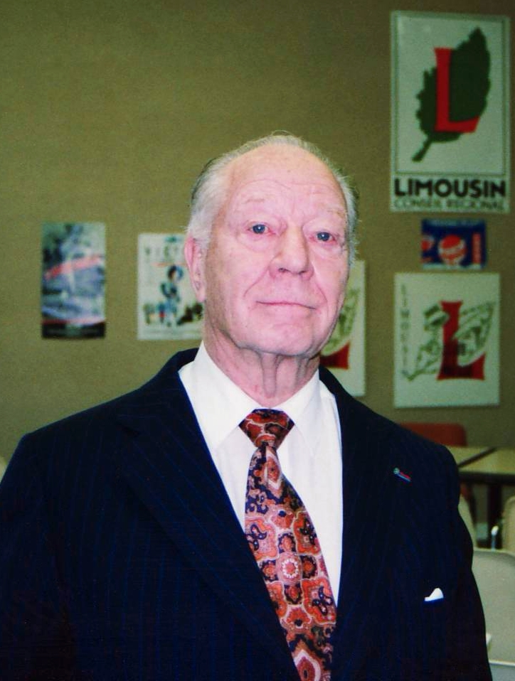 Portrait de Louis Toffoli